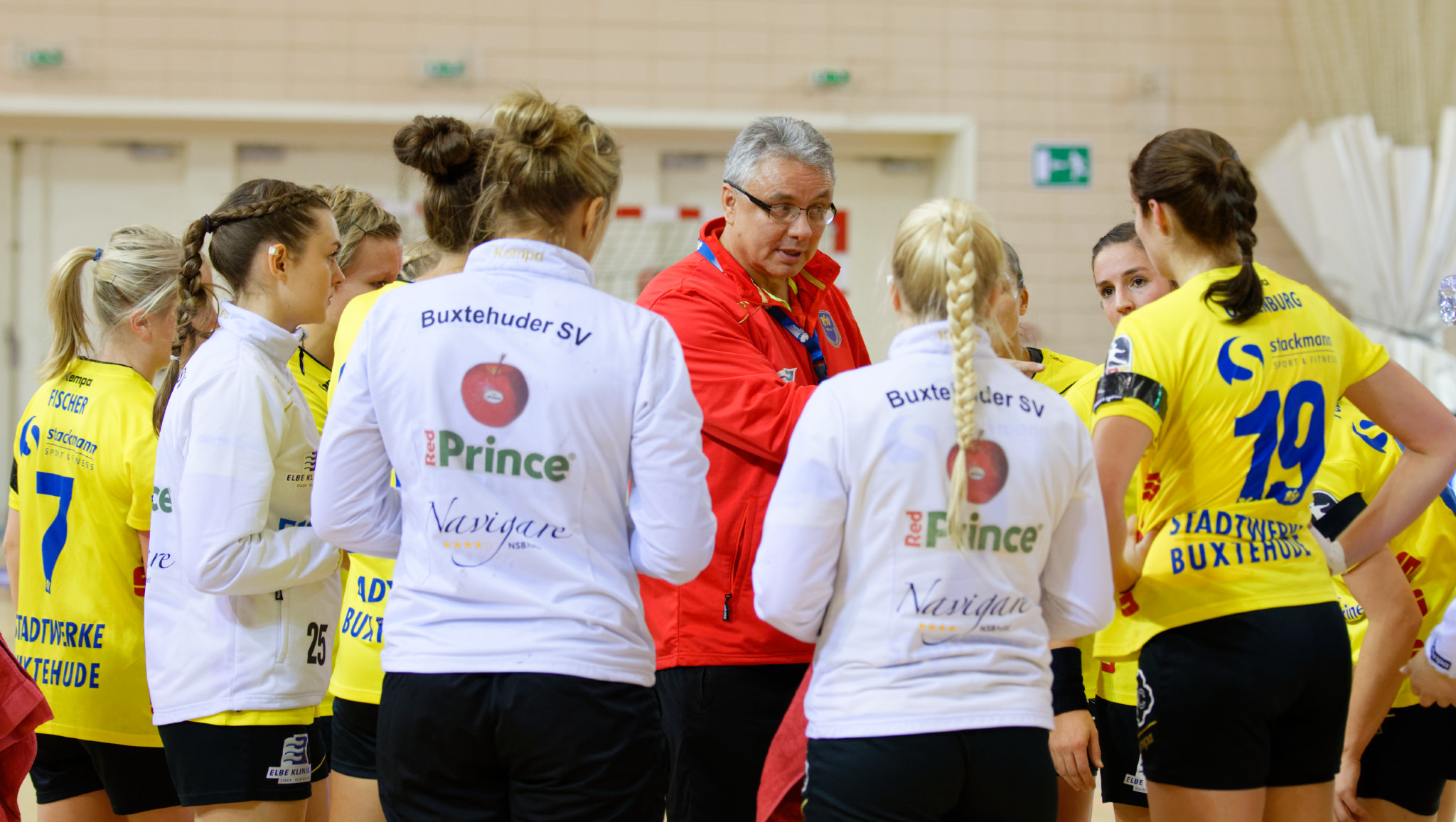 Rencontre du 3e tour de la Coupe des Vainqueurs de Coupe. A Issy Les Moulineaux, le 22 novembre 2015.